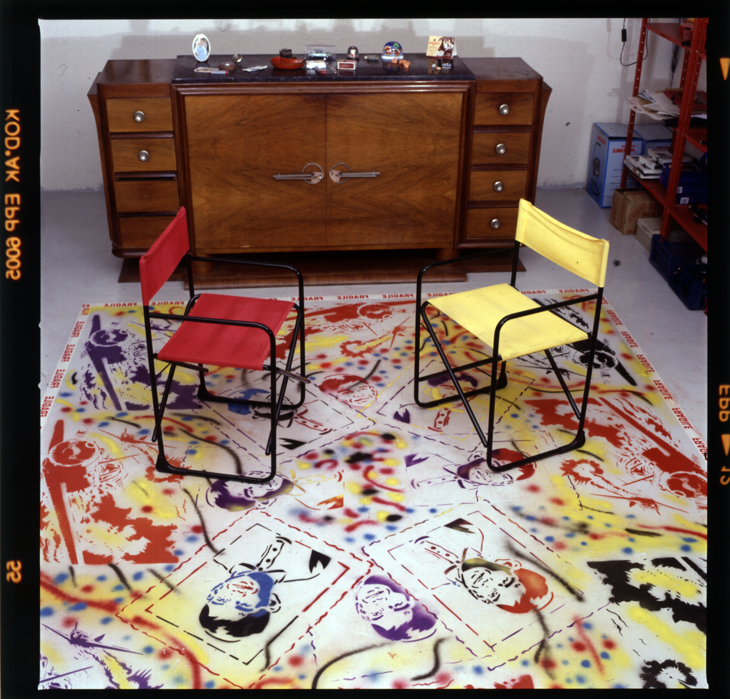 Pochoirs et peinture sur le sol d'un studio formant un tapis au sol